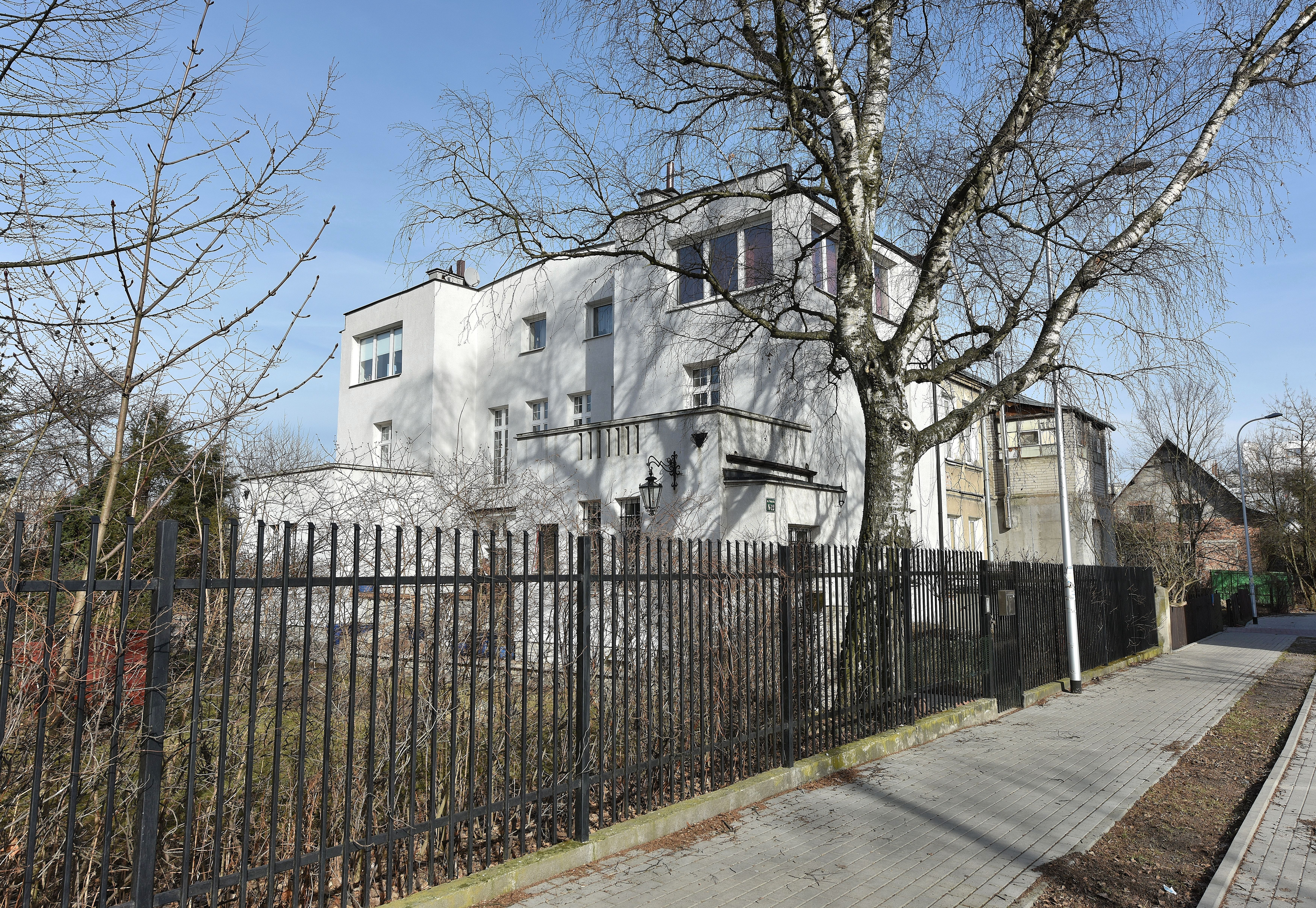 Willa Szypowskich przy ul. Podolskiej 12 w Warszawie (widok od strony ul. Łysogórskiej)